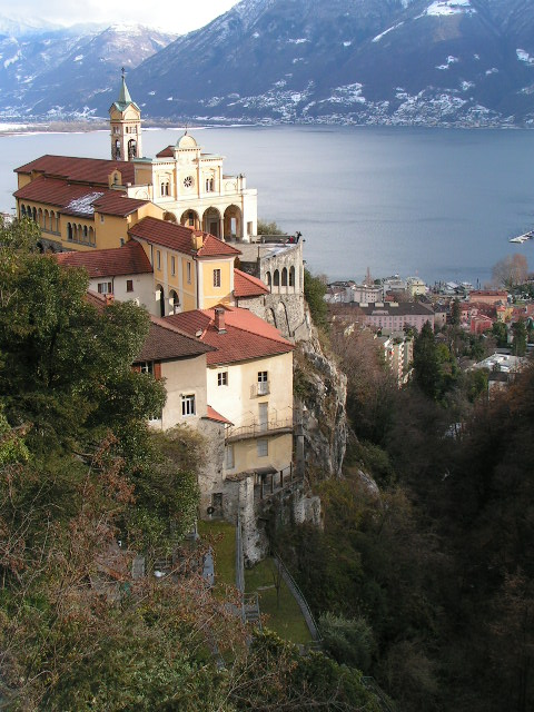 Il Santuario della Madonna del Sasso fatta da Elvezio